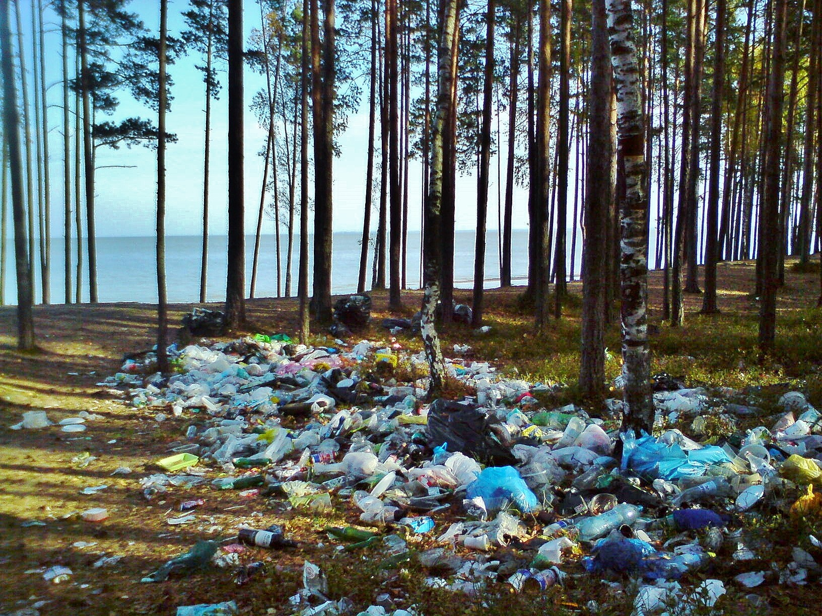 Куча мусора оставленного отдыхающими в заказнике,октябрь 2014 г.